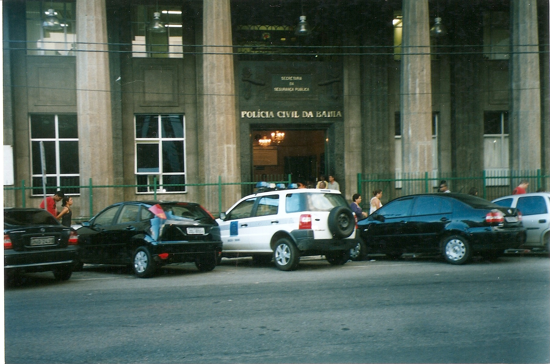 Police Headquartes in Salvador - BA